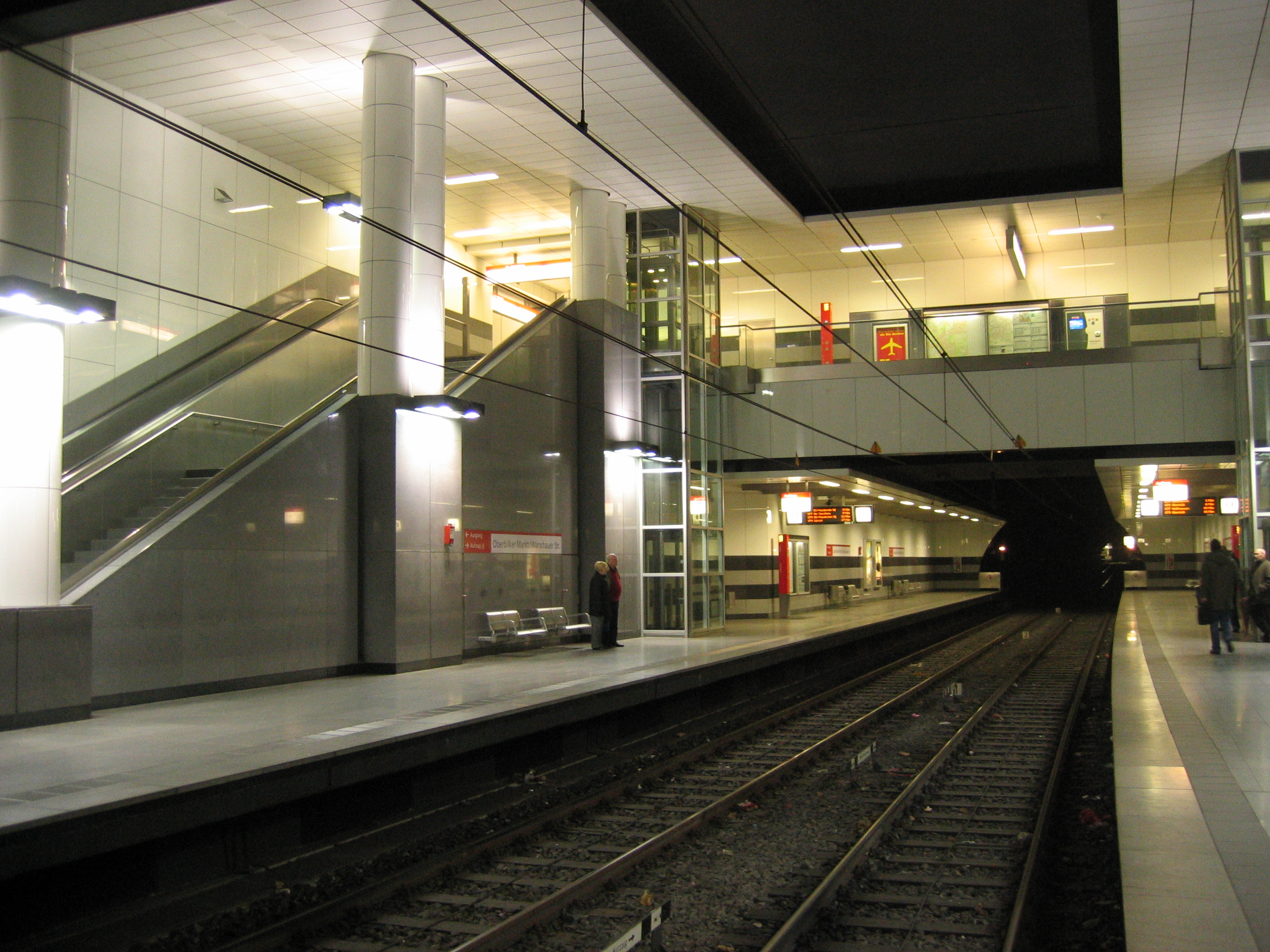 Stadtbahn Düsseldorf, U-Bahnhof Oberbilker Markt / Warschauer Straße